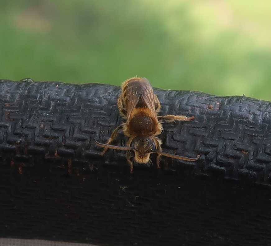 Rophites algirus Männchen fotografiert an einem Südhang des Kyffhäuser